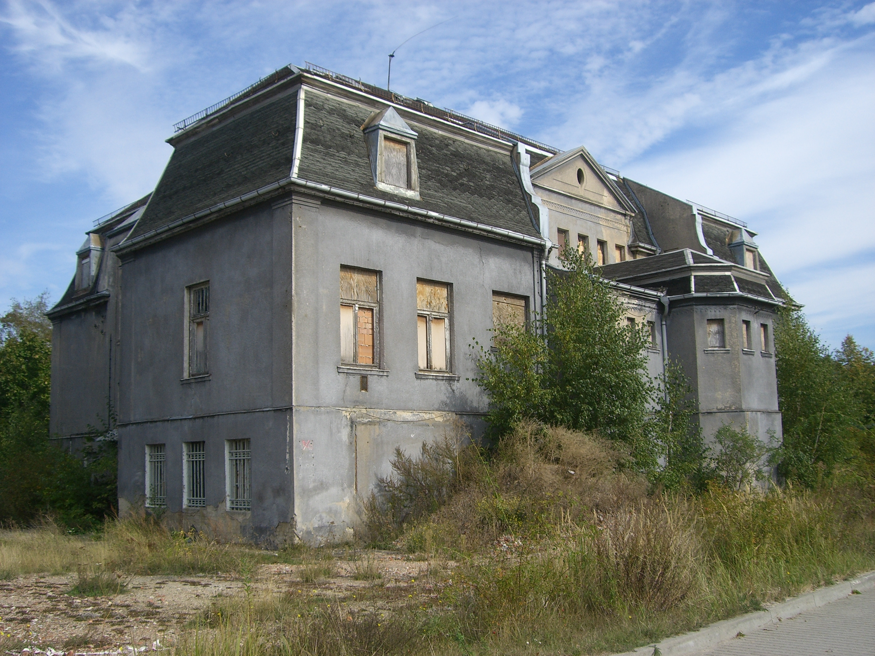 Furhmannsche Fabrikantenvilla Jessen